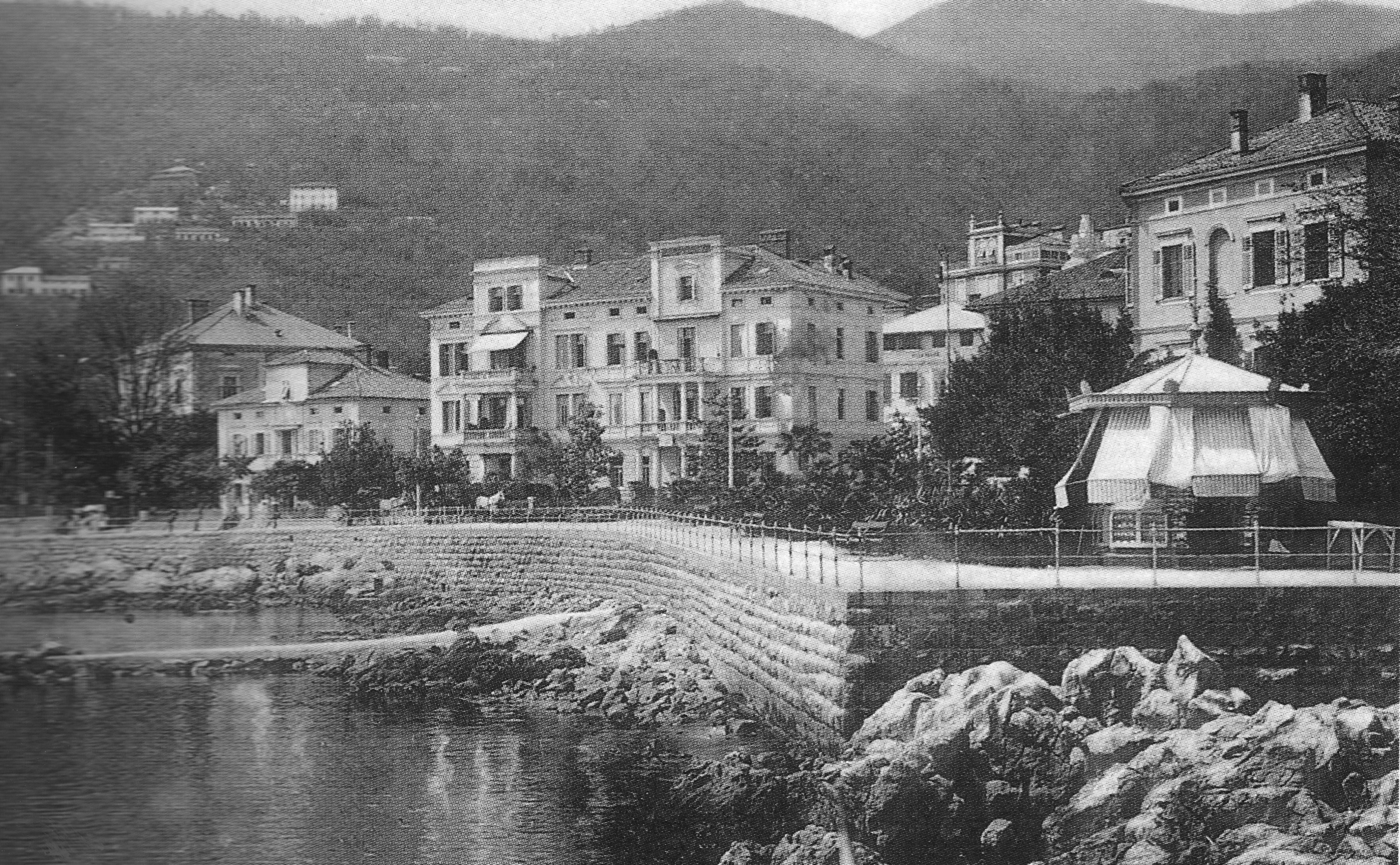 Opatija (Abbazia), Strandweg